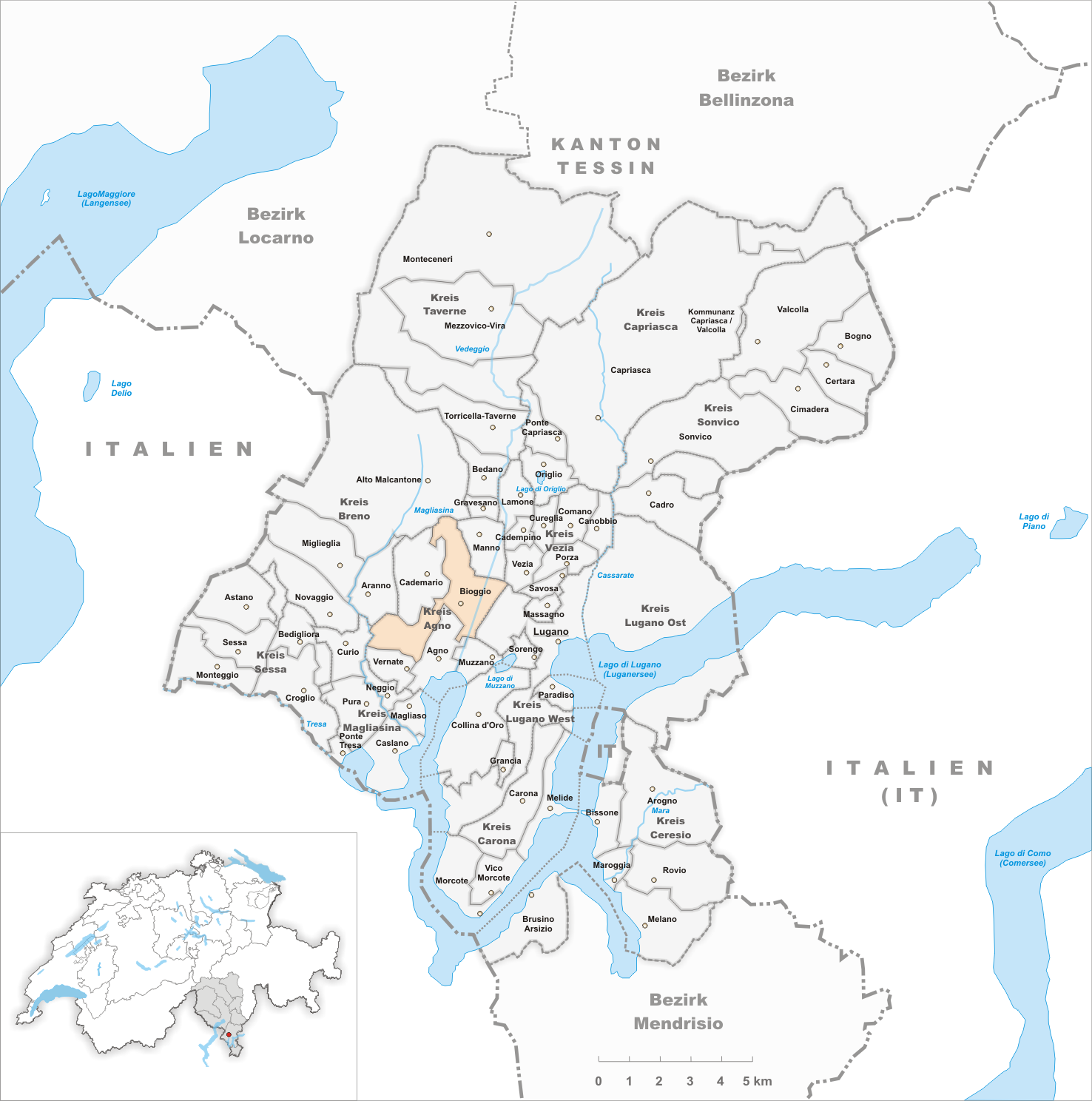 Municipality Bioggio